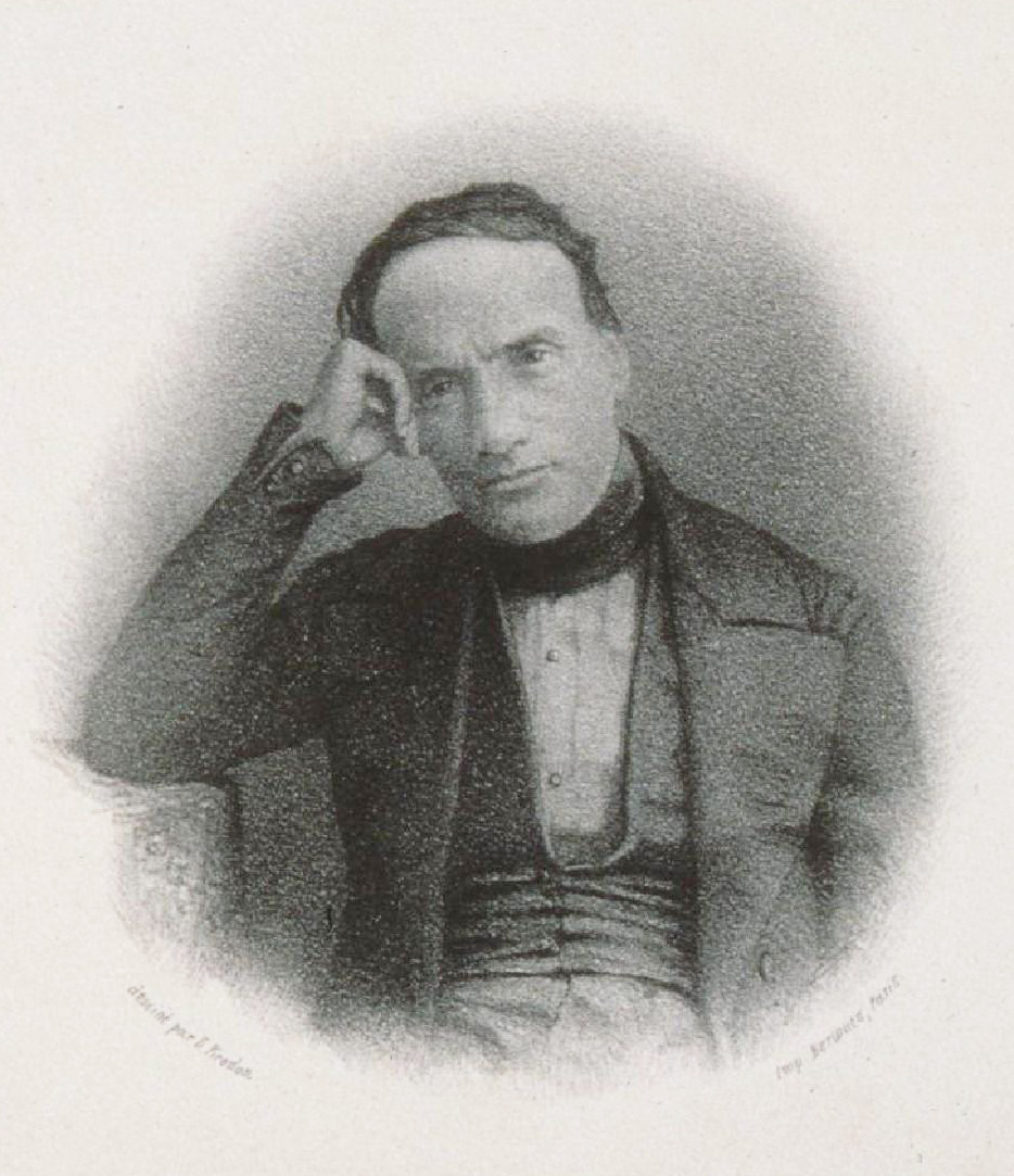 Paul-Constant Billot, né à Rambervillers (Vosges) le 12 mars 1796, mort à Mutzig (Bas-Rhin) le 19 Avril 1863, Mi-corps, face